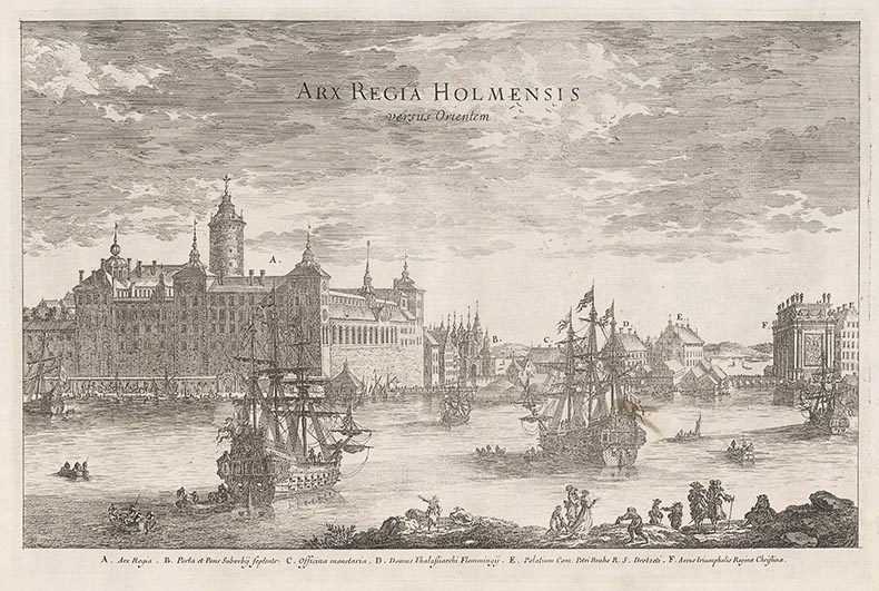 Titel Arx Regia Holmensis Titel i översättning Stockholms gamla slott från öster